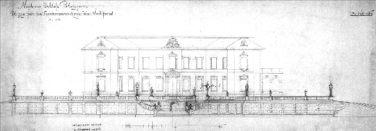 Tiškevičiai Palace in Palanga design.